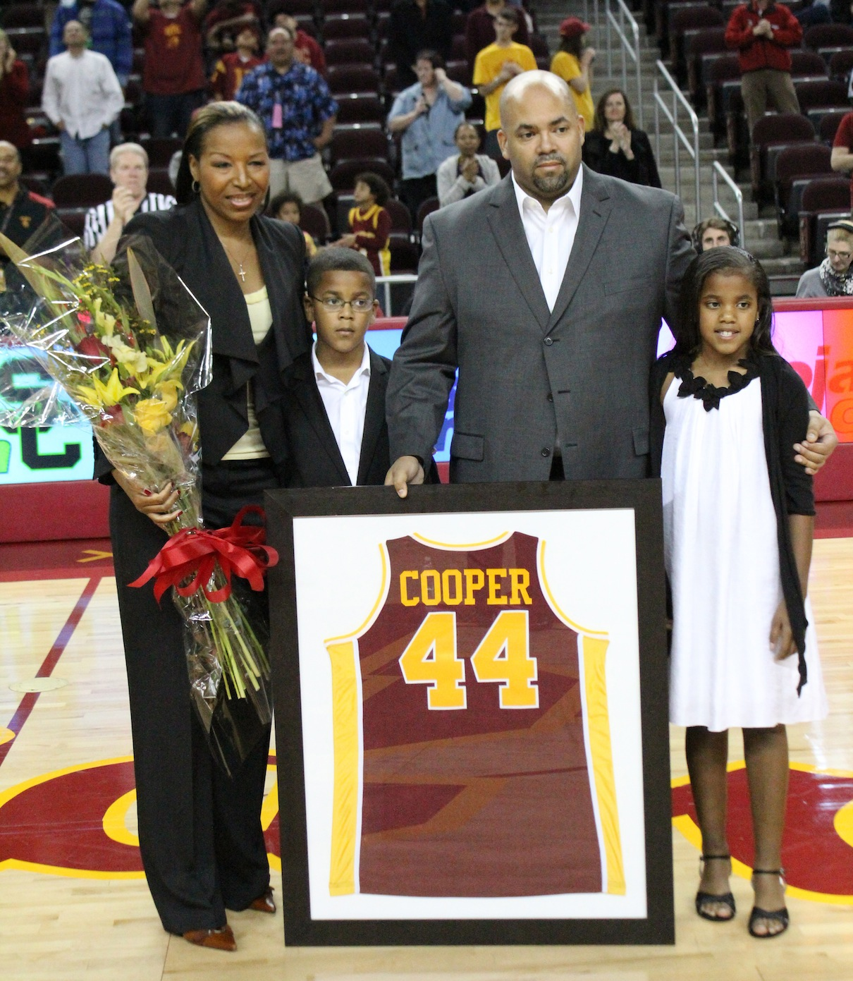 Cérémonie de retrait du retrait du numéro 44 porté à USC par la basketteuse Cynthia Cooper